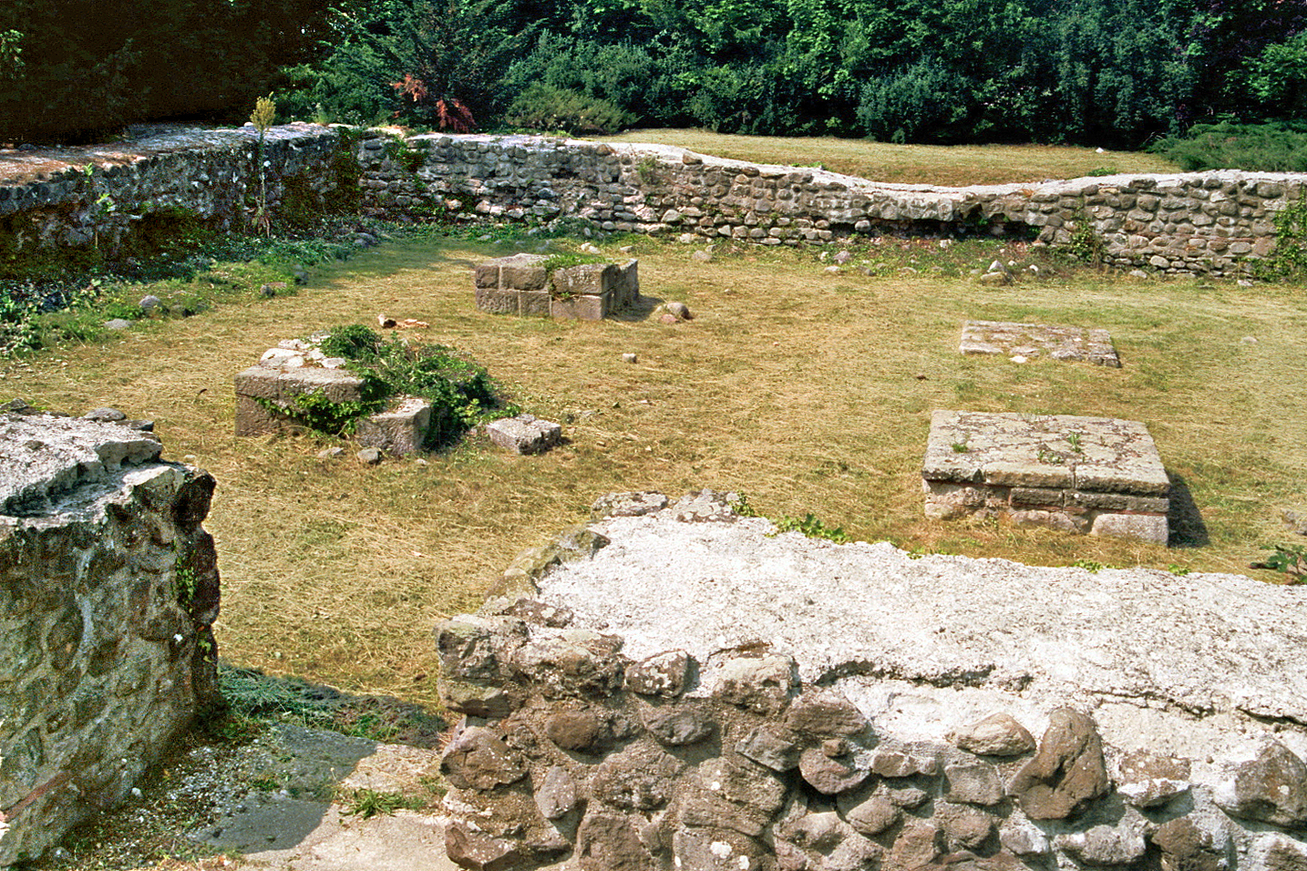 Burgus